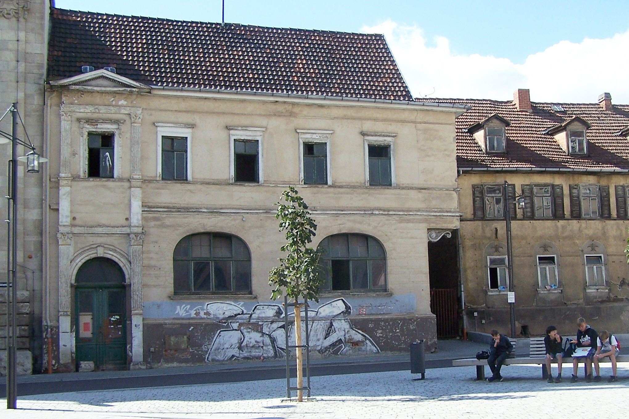 Das 1901 eröffnete, im Stil eines klassizistischen Hauses am Johannisplatz 16 in Eisenach befindliche ehemalige Hotel Mille auf der Südseite des Platzes ist ein Baudenkmal der Wartburgstadt. Das ehemalige renommierte Restaurant "Mille" - ist heute eine Ruine.